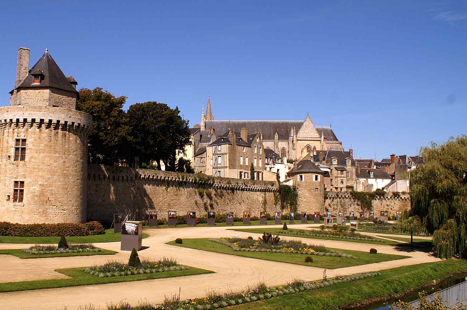 Vannes, remparts, tour du Connétables, cathédrale, et jardins